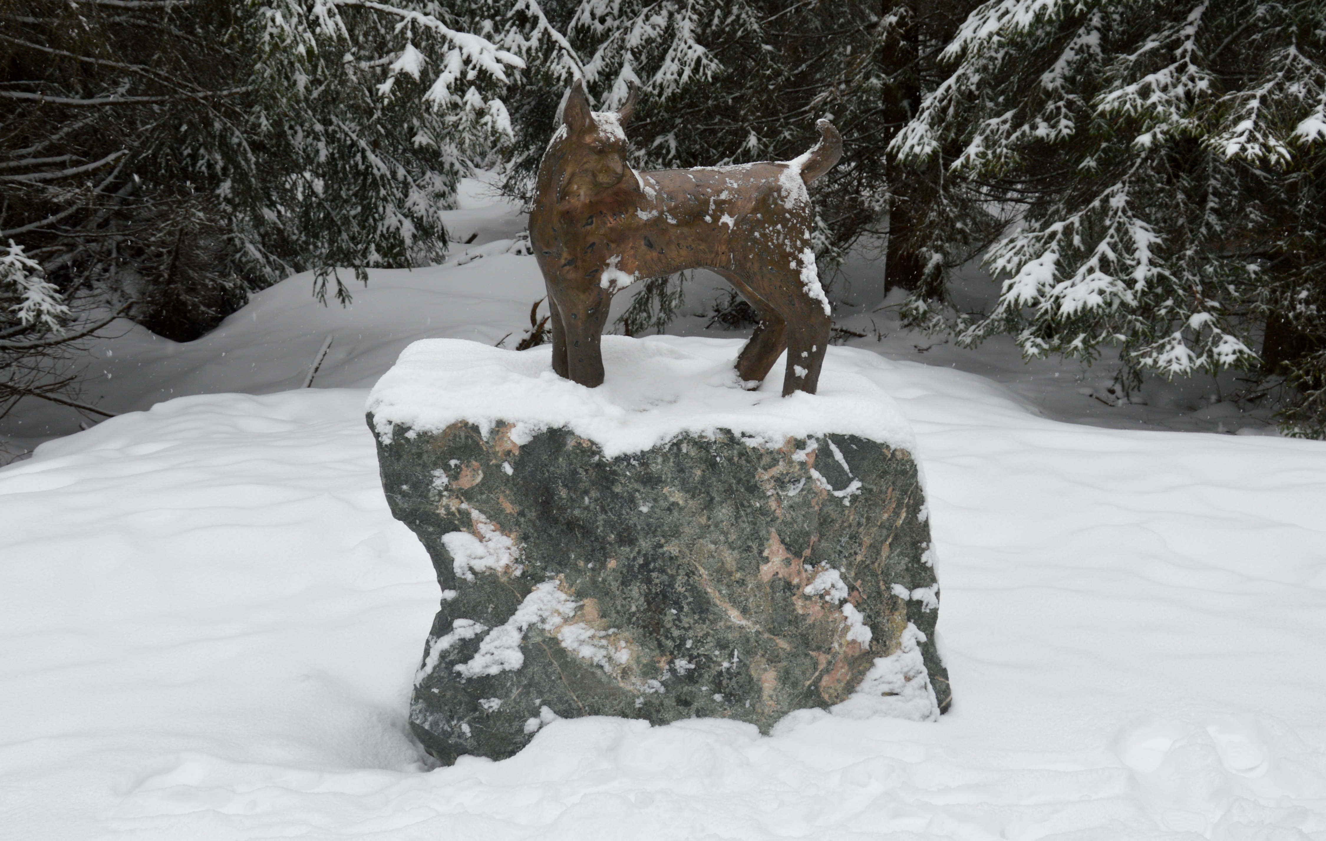 Neues Luchsdenkmal